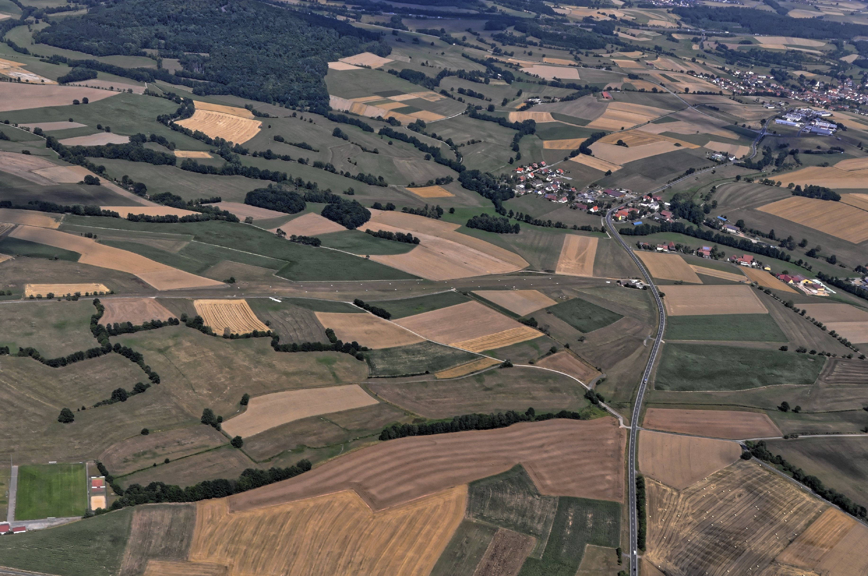 Bilder vom Flug Nordholz-Hammelburg 2015: Flugfeld Oberleichtersbach; an der St2431 in der Bildmitte rechts Einraffshof und am rechten Bildrand oben Schondra.